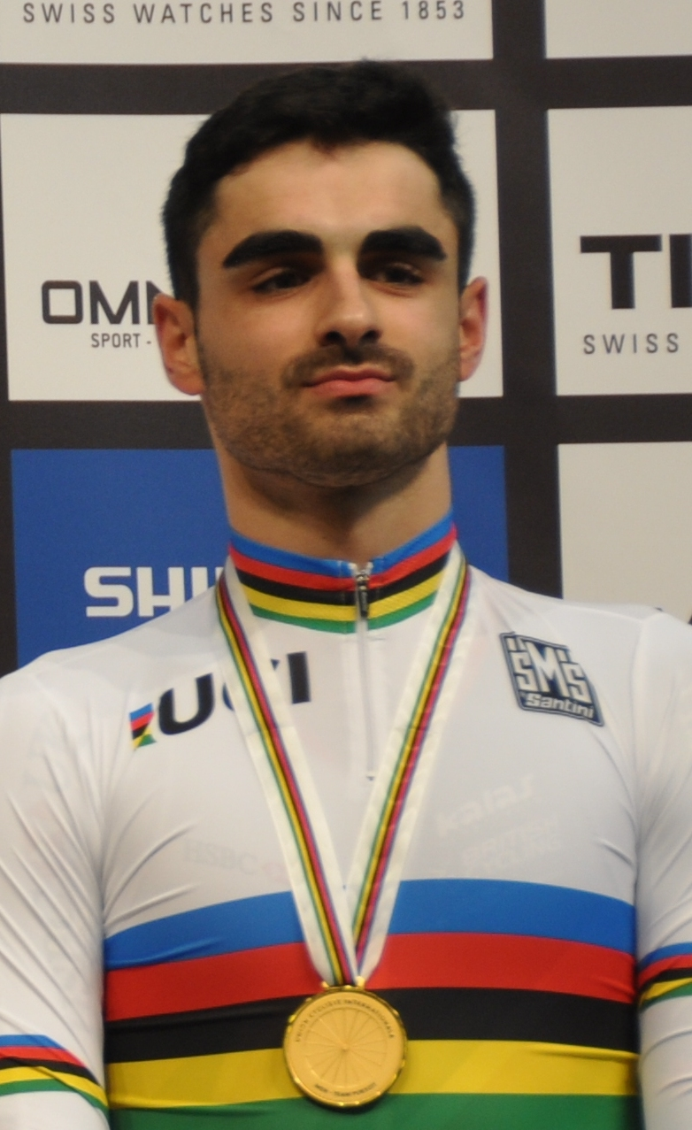 Kian Emadi, britischer Radsportler